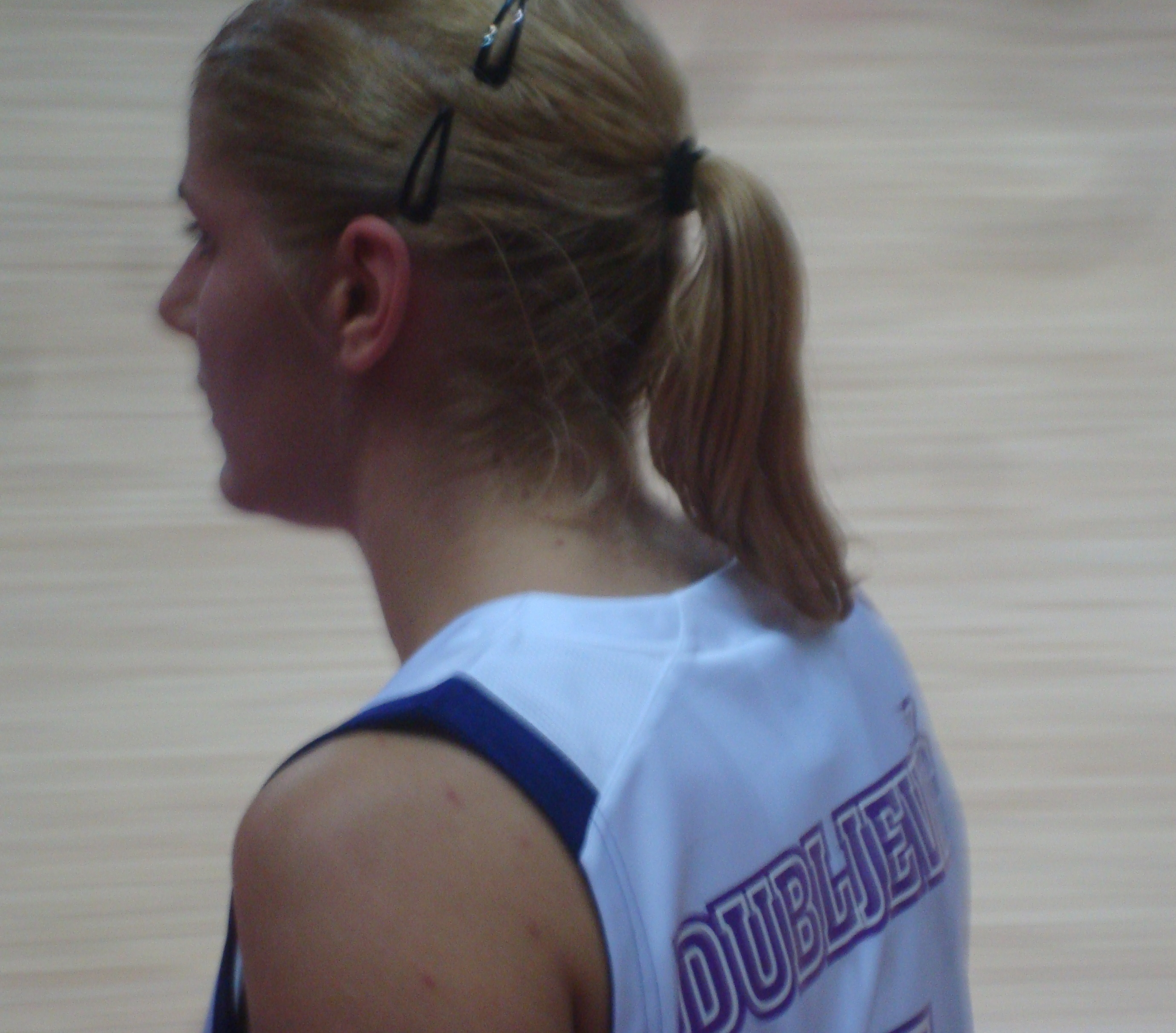 La basketteuse serbe Jelena Dubljevic à l'Open LFB